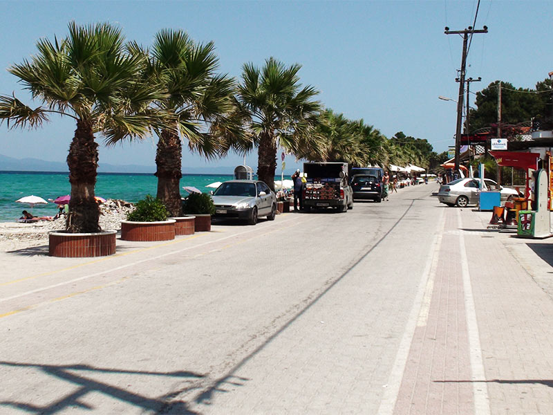 Пефкохори, набережная